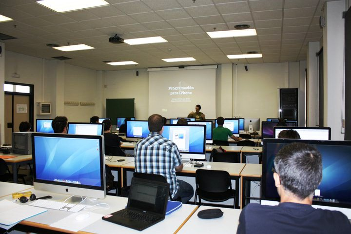 Interior clase del campus de Gandia UPV